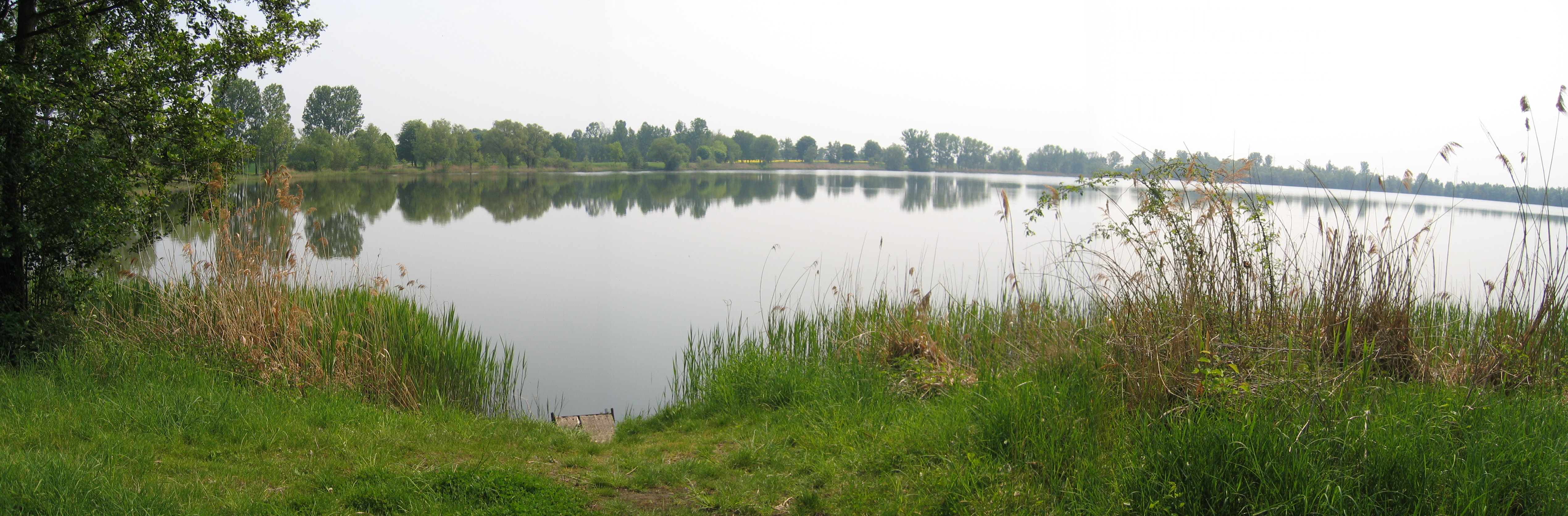 Panorama vom Wölfersheimer See, Blickrichtung: Süd-Ost